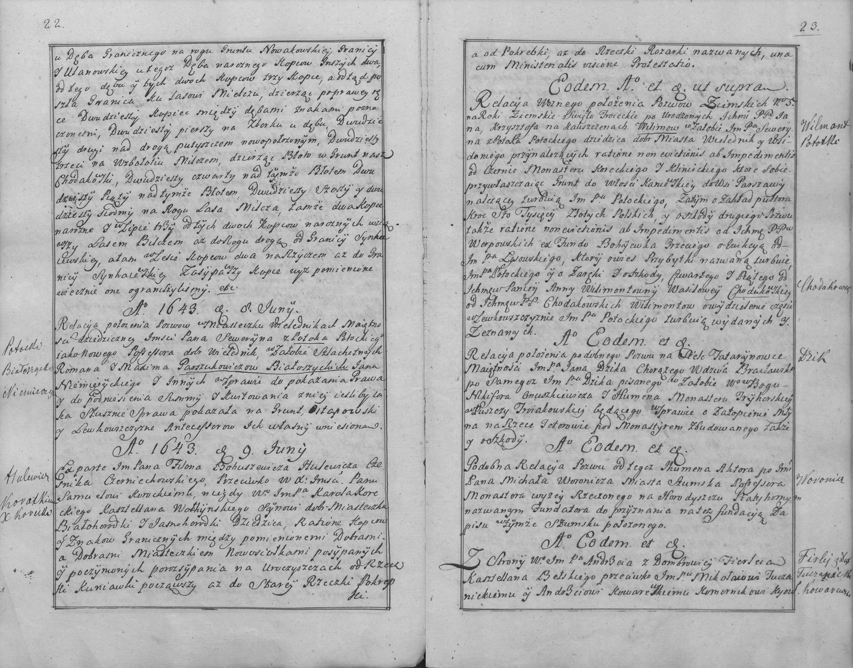 Sumariusz z aktów kijowskich, bracławskich, wołyńskich i in. oraz z ksiąg Trybunału Koronnego, z Metryki Koronnej i Litewskiej obejmujący lata 1347-1701. (Karty 22-23)